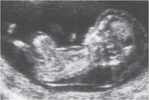 Clarté nucale élevée d'un foetus de 12 semaines. Ici la pathologie qui en est à l'origine est une trisomie 18.